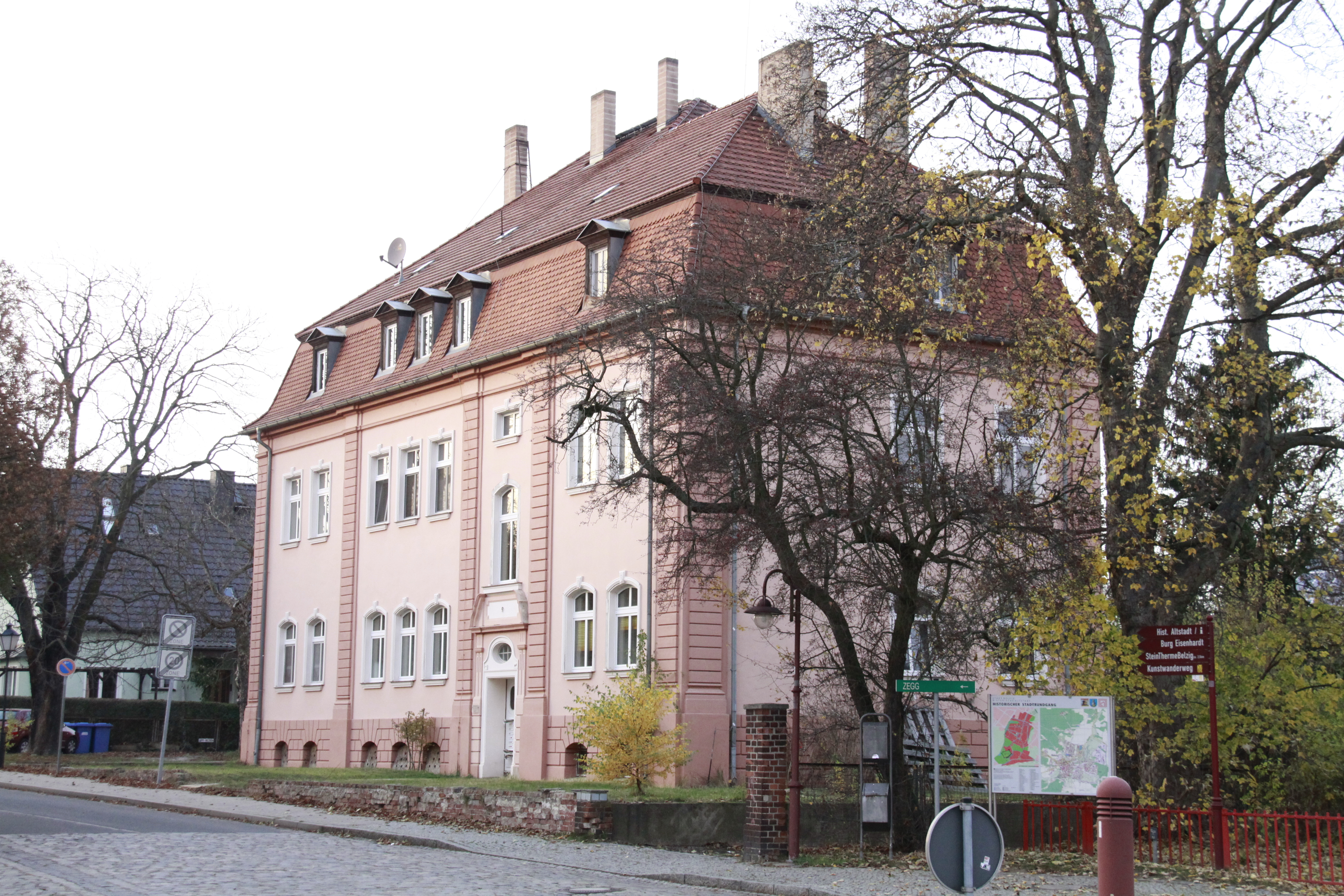 Ehemaliges Haus der Bahninspektion, Baudenkmal, alle einst zum Bahnhof gehörenden Gebäude wurden unter Denkmalschutz gestellt.